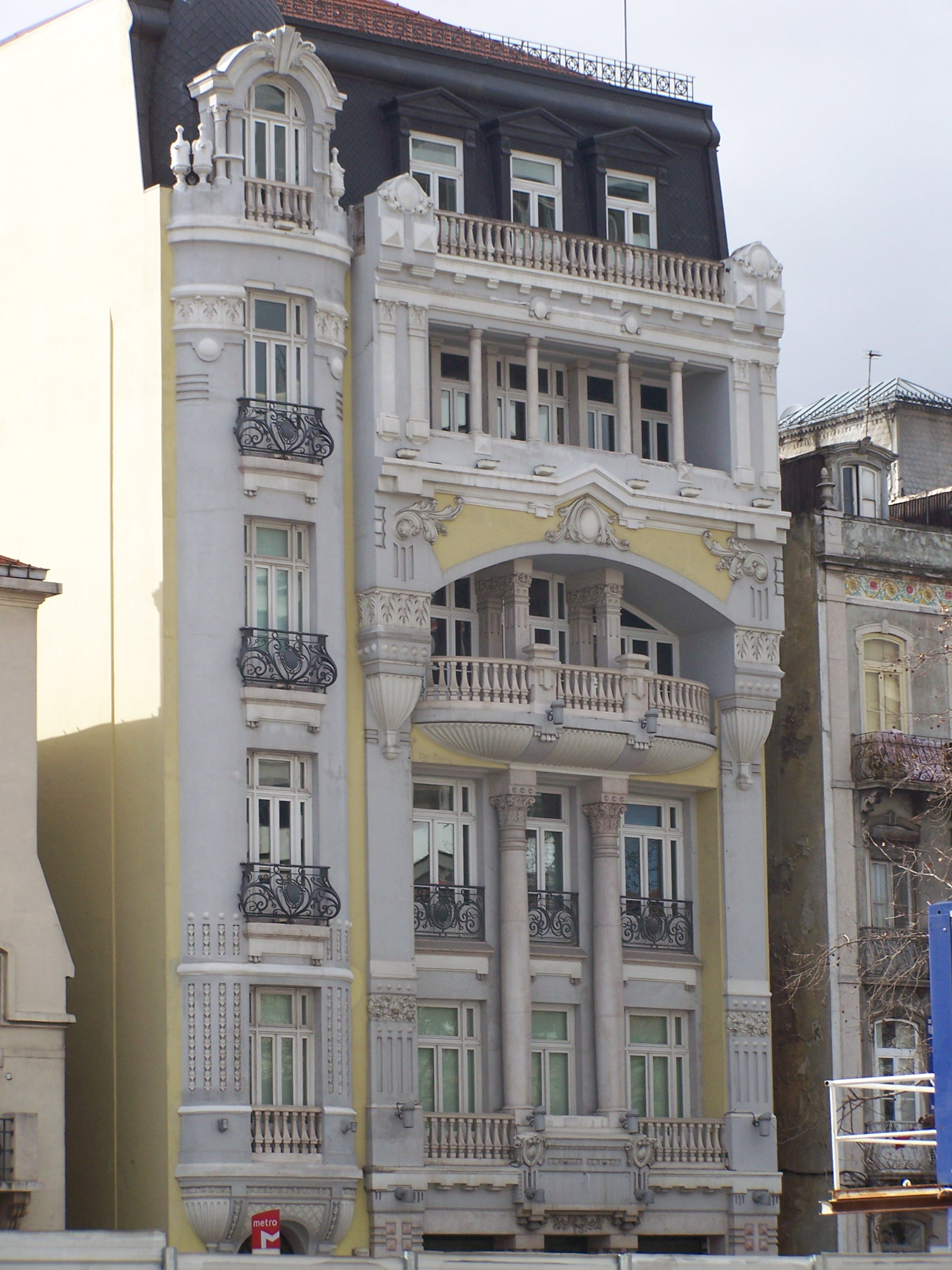 Edifício na Avenida da República, nº15, onde se encontra a Pastelaria Versailles. Classificado como Imóvel de Interesse Público.